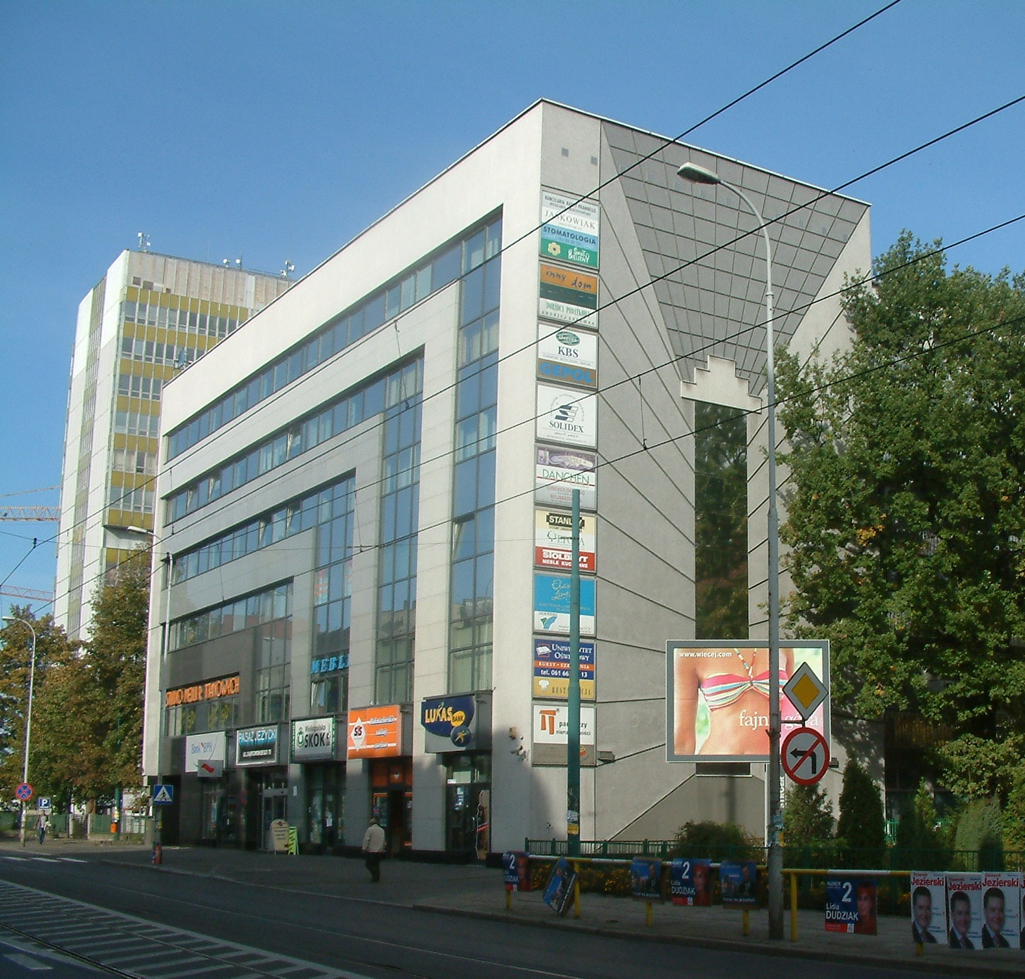 Jeżycki Passage in Poznań